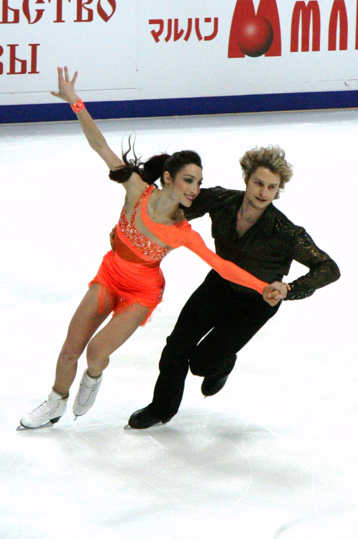 Мэрил Дэвис и Чарли Уайт на Кубке Ростелекома 2011. Короткий танец - латина.